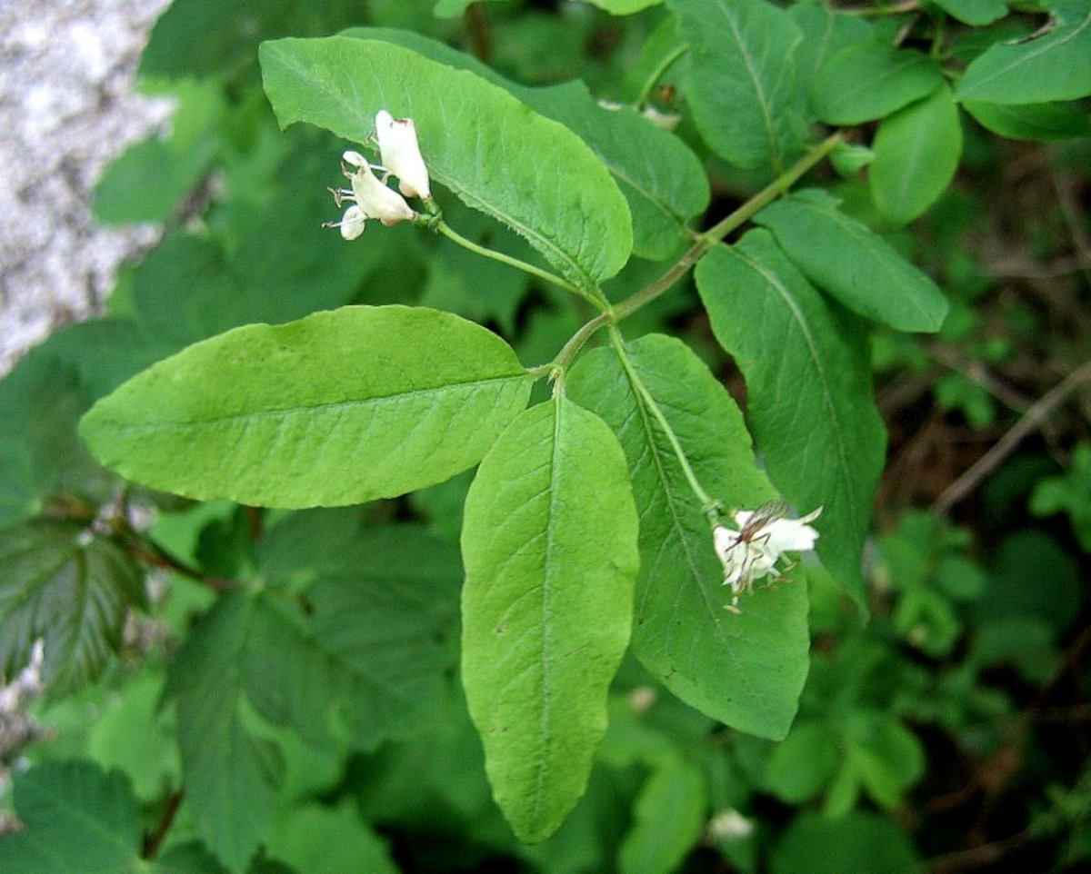 Črno kosteničevje v dolini Kamniške Bistrice.